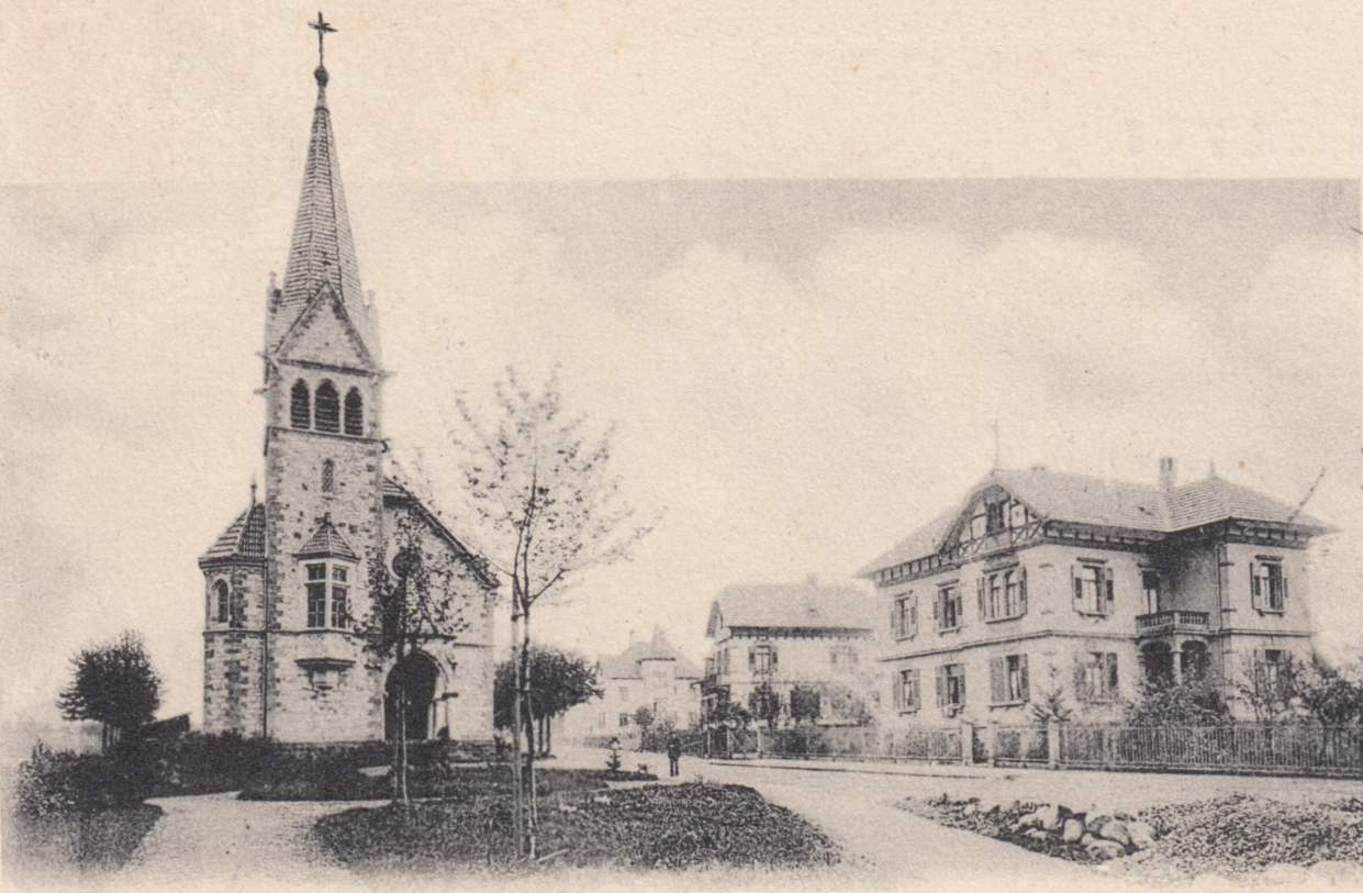 Foto der evangelischen Kirche Staufen 1903